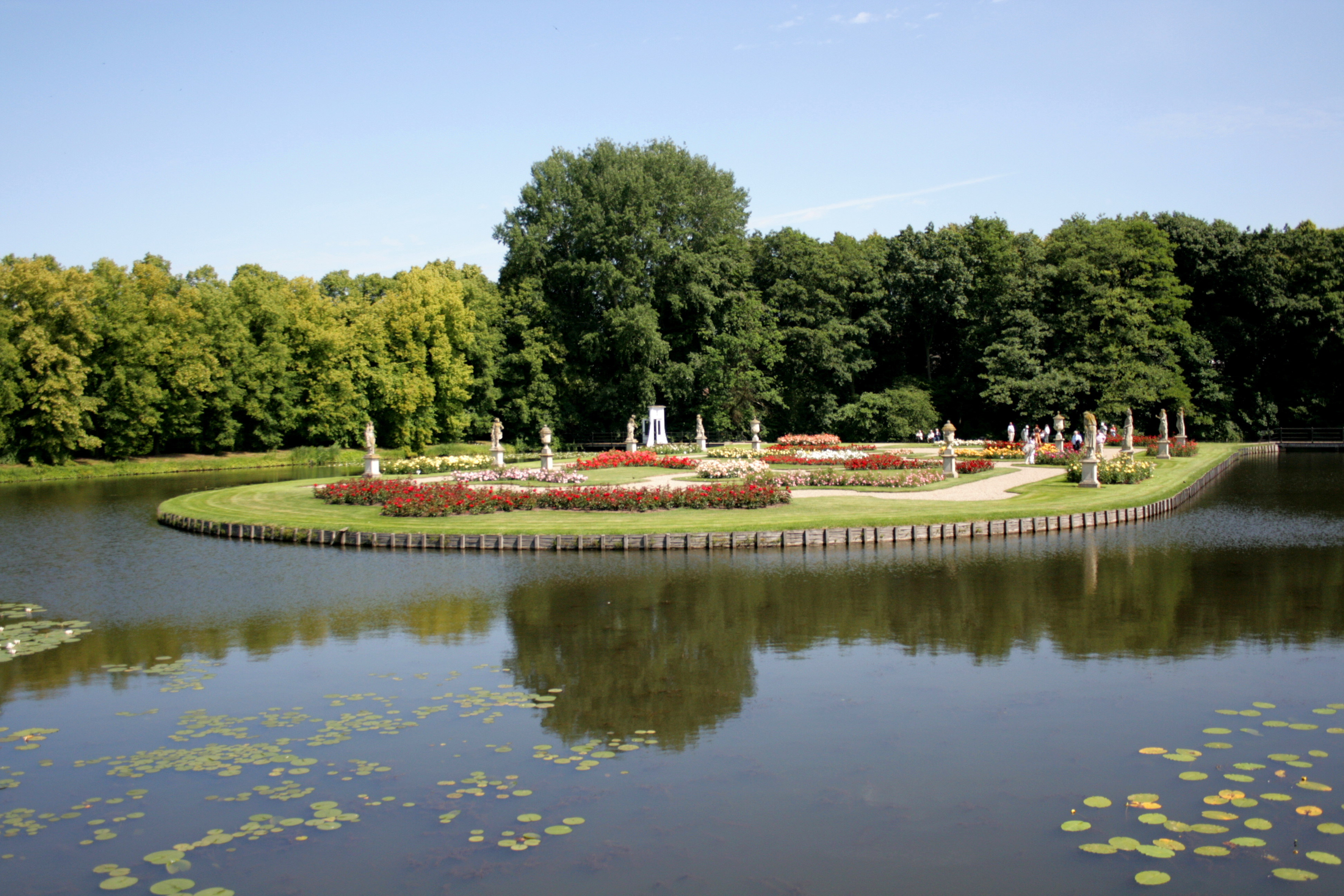 Park der Wasserburg Anholt in Anholt, Isselburg